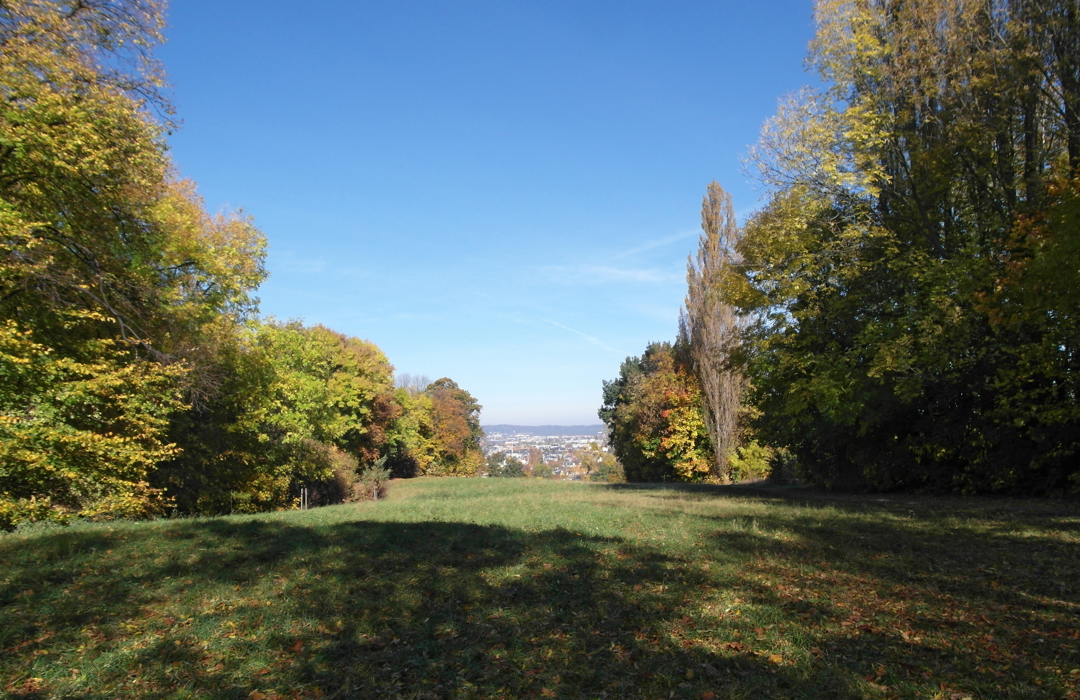 15.10.2017 01187 Dresden-Plauen, Schleiermacherstraße: Blick vom Park Am Hohen Stein (GMP: 51.025397,13.703322) talwärts nach Norden über Plauen, die Südvorstadt, Dresden-Friedrichstadt bis zu den Hellerbergen am Horizont. [SAM2323.JPG]20171015120DR.JPG(c)Blobelt